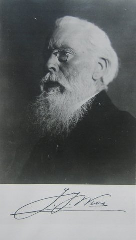 Foto afkomstig van Bidprentje uit 1942